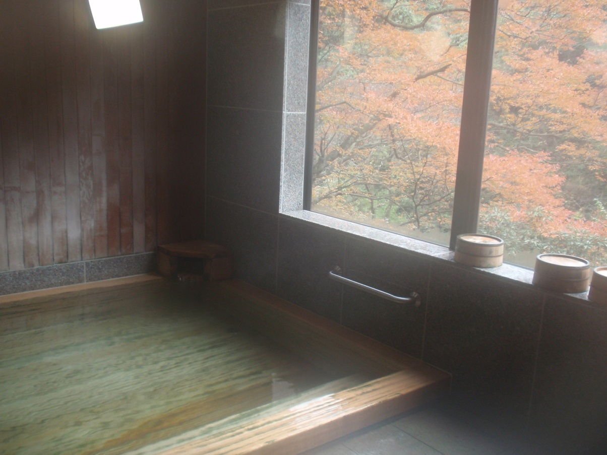 石川県金沢市の銭かめ